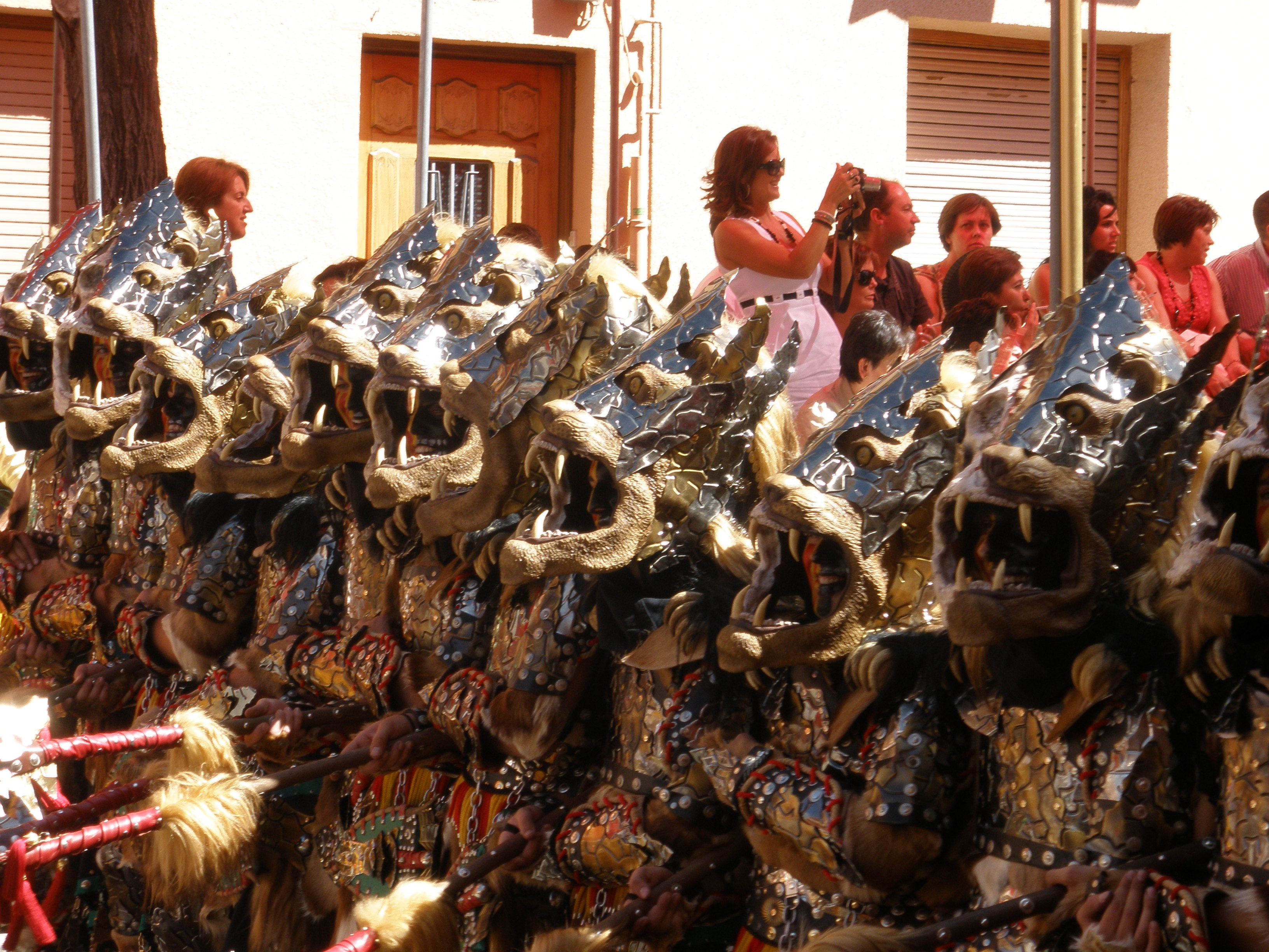 Moros y Cristianos en Ibi Alicante